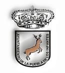 Escudo de La Puebla de los Infantes (Sevilla, España)